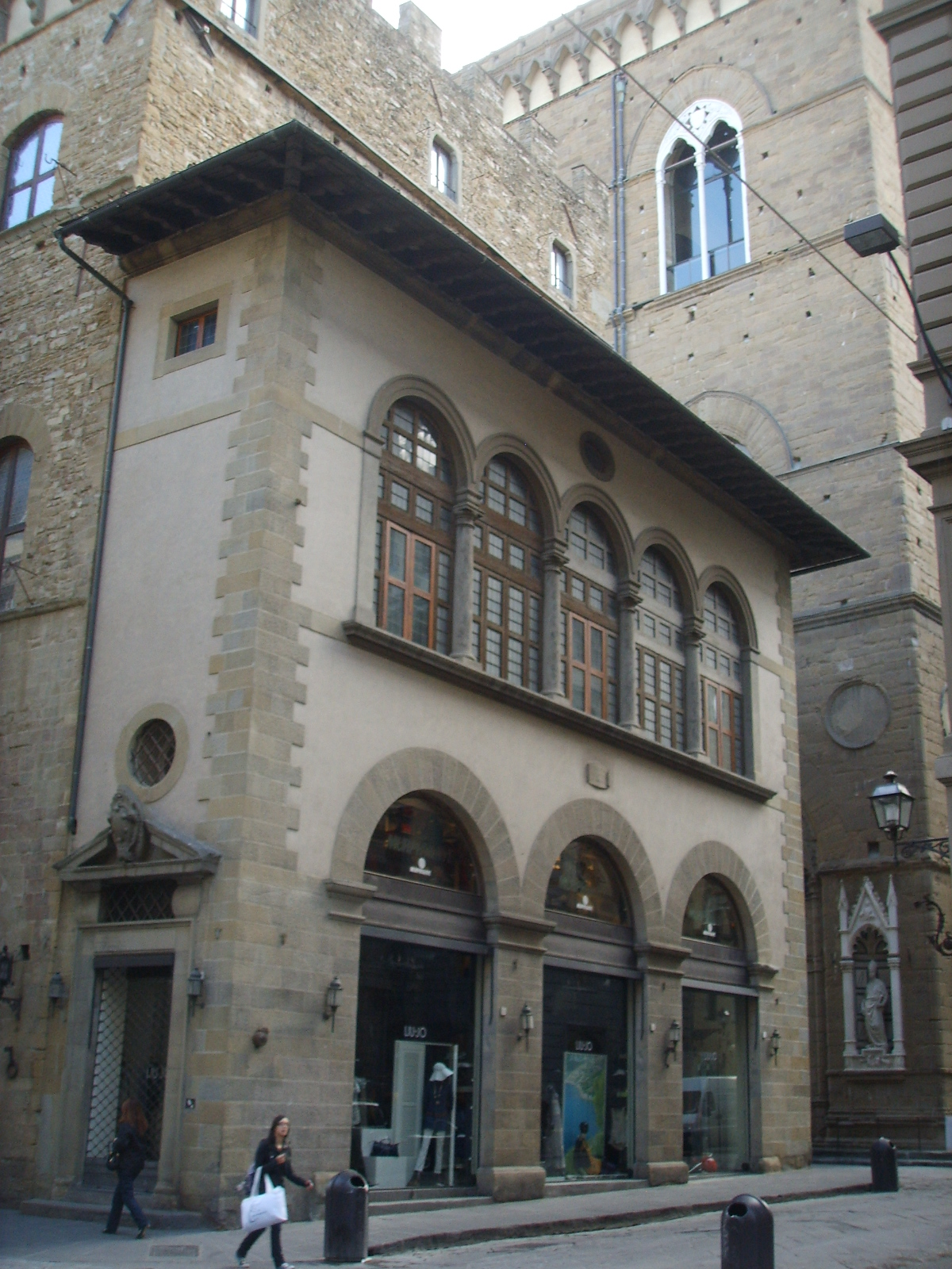 Palazzo dell'arte della lana, aggiunta neorinascimentale